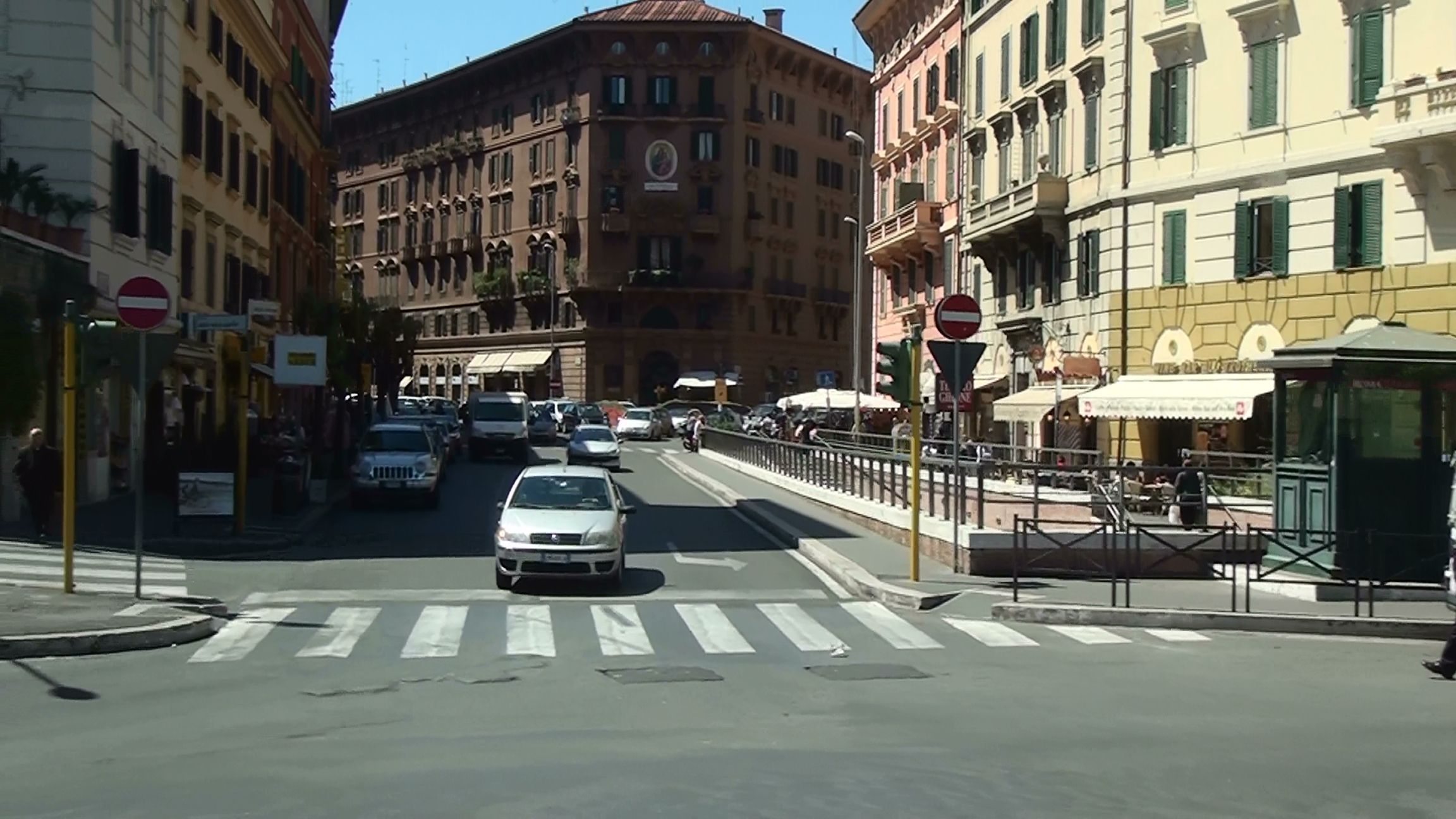 Quartiere XIII Aurelio, Roma, Italy